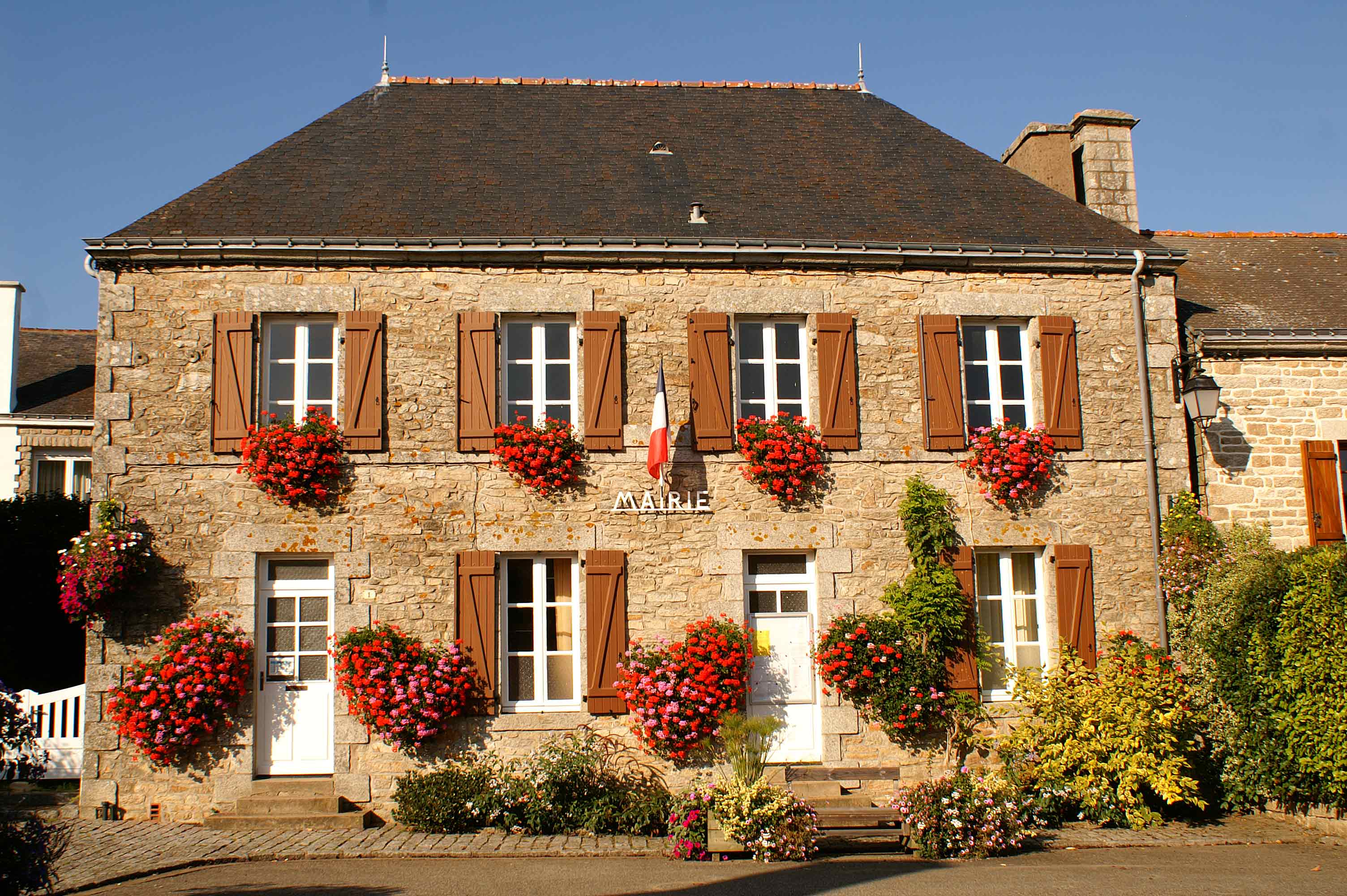 Mairie de la commune de La Vraie-Croix dans le Morbihan